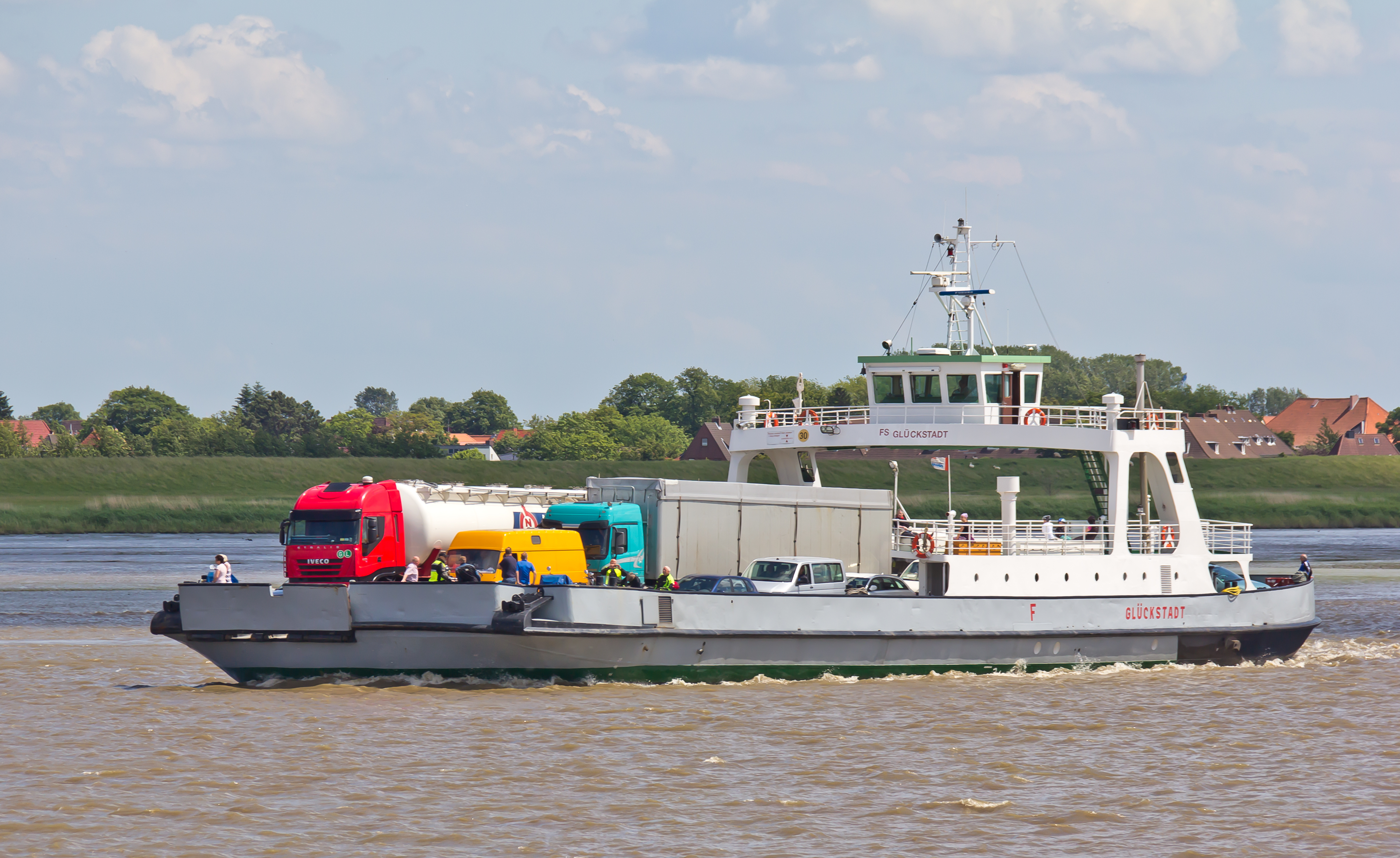 Überfahrt mit der Elbfähre Wischhafen-Glückstadt. Die FS Glückstadt im Gegenverkehr.